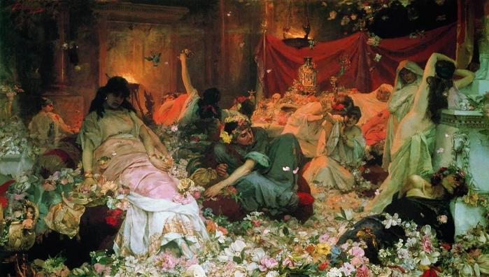 Buried in Flowers